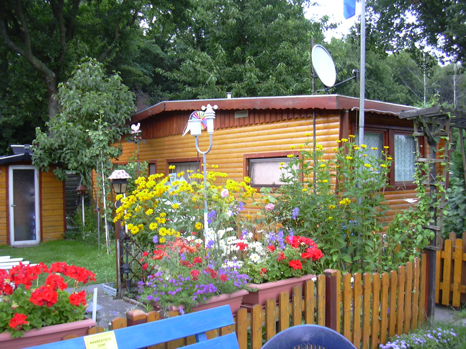 camping hut See Freigericht-Ost, near Aschaffenburg, Bavaria/Germany